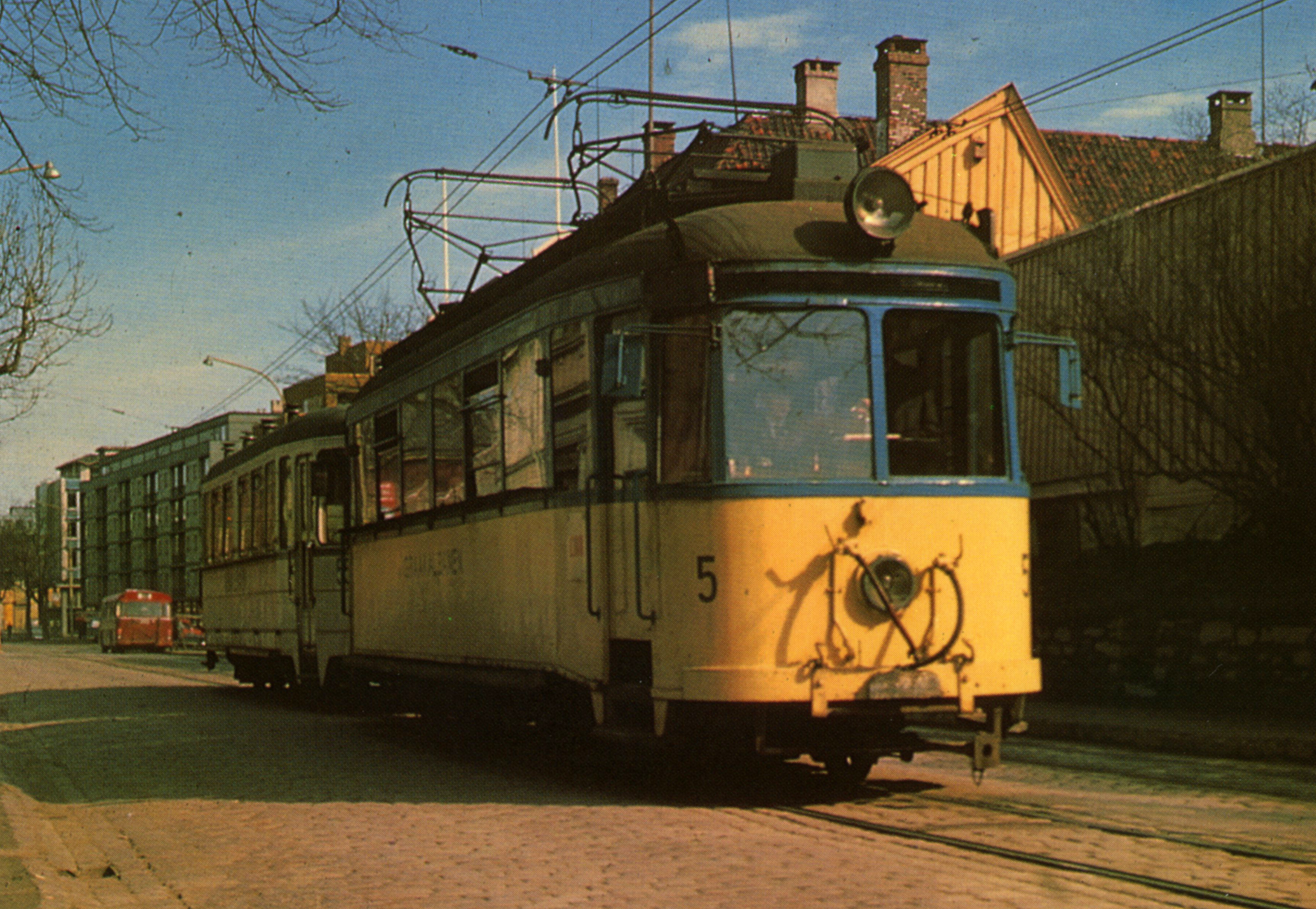 Format: Fotopositiv. Gråkallbanen i Kongens gate i 1966. Motorvogn 5 er bygd av Skabo / SSW i 1942. Tilhenger 55 er bygd av HØKA i 1955. Begge vognene er bevart. Fra et postkort. Foto: O. A. Korsnes